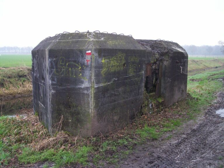 Bunker der Peel-Raam Linie, Typ Stachelschwein, eigenes Bild.